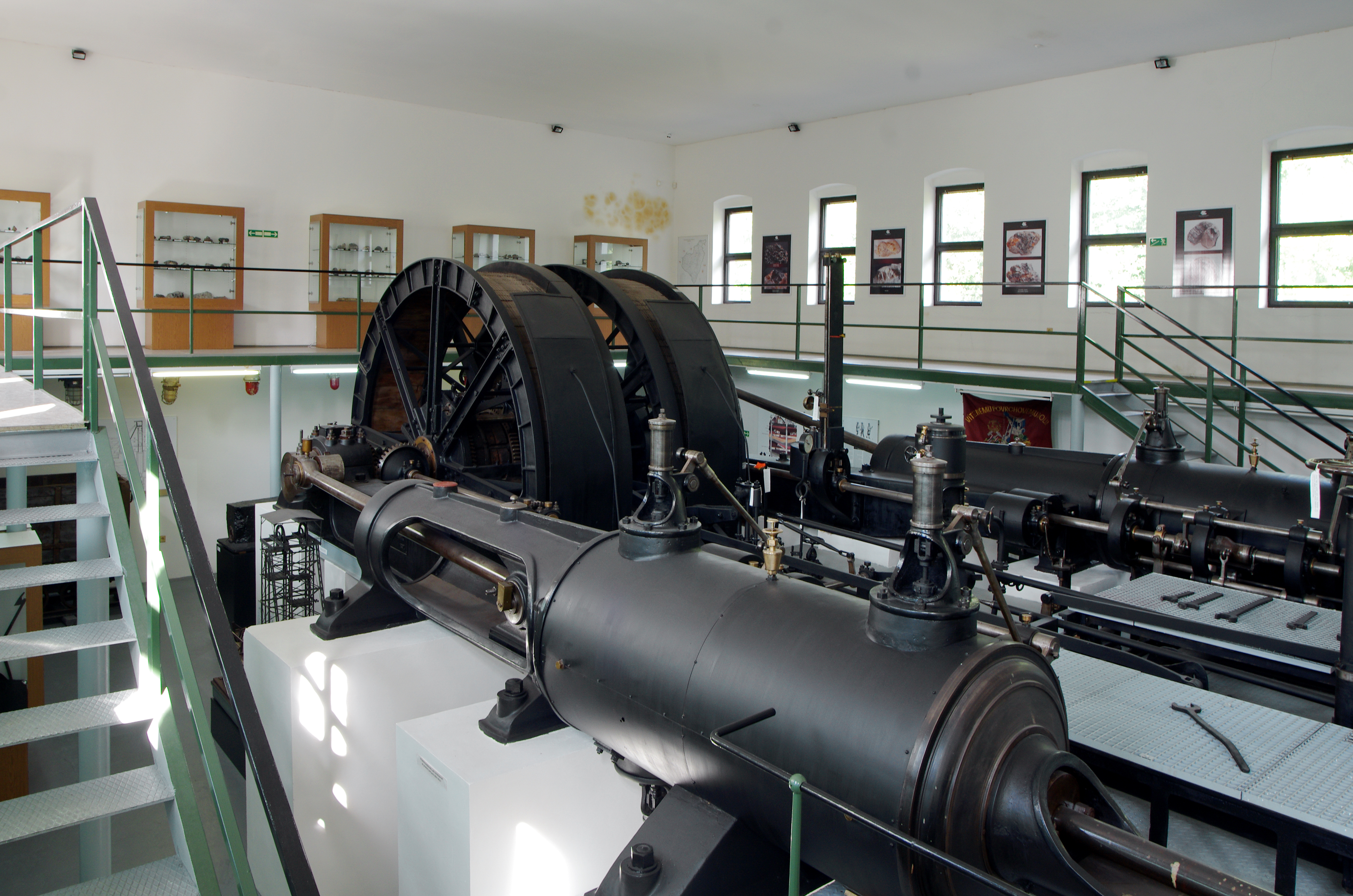 Krásno, hornické muzeum - parní těžní stroj z dolu Marie v Královském Poříčí, okres Sokolov